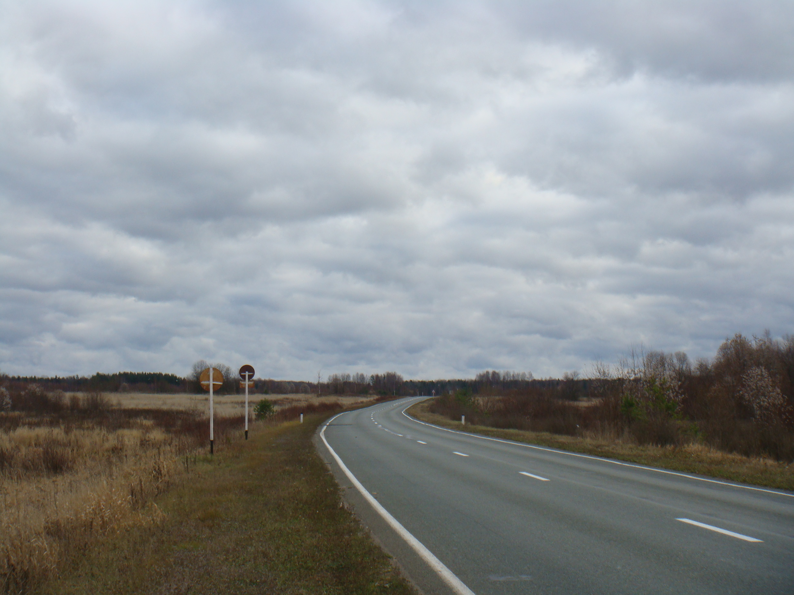 Дорога в Шабалинском-Свечинском районах, осень 2009